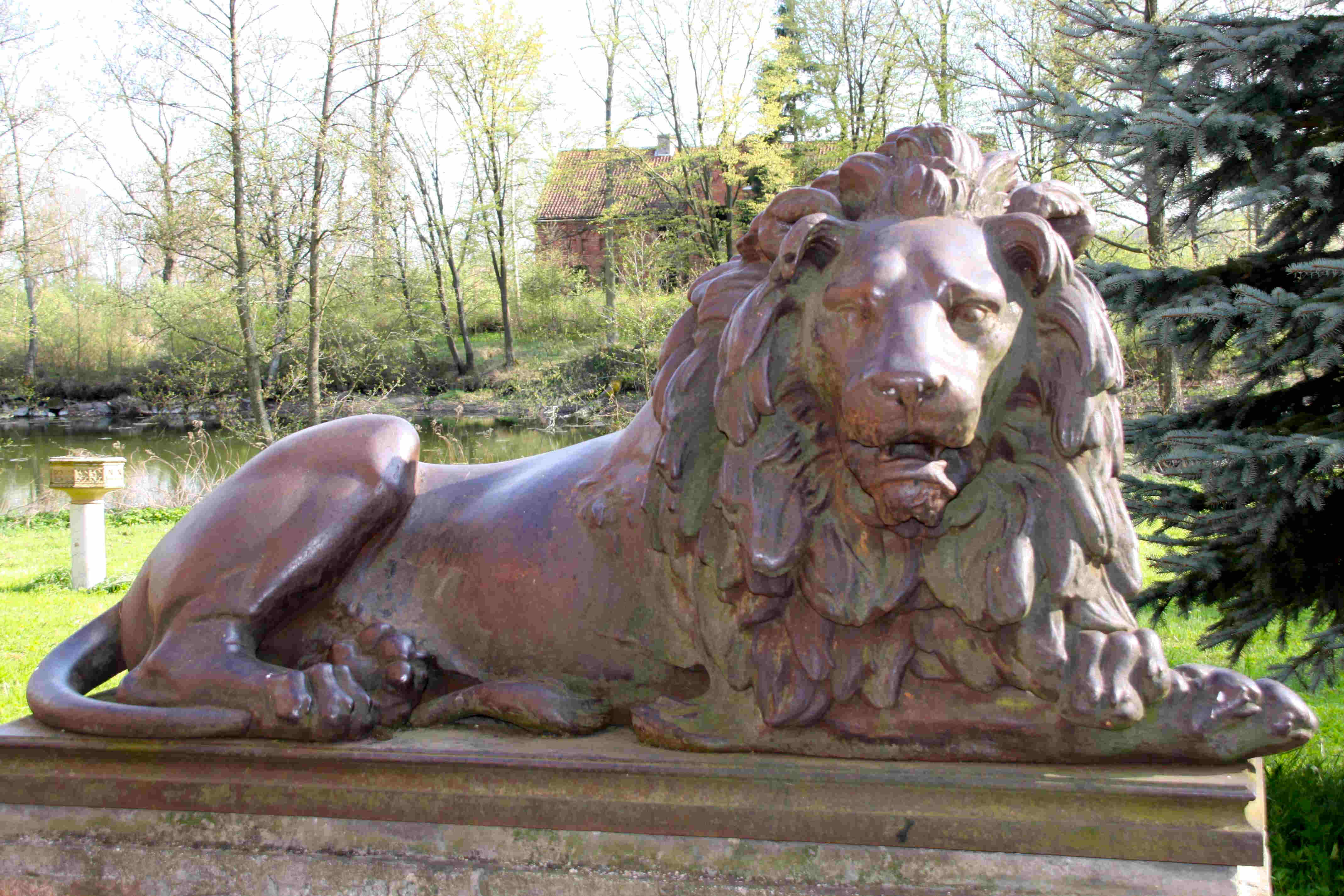 Juditten - wachender Löwe